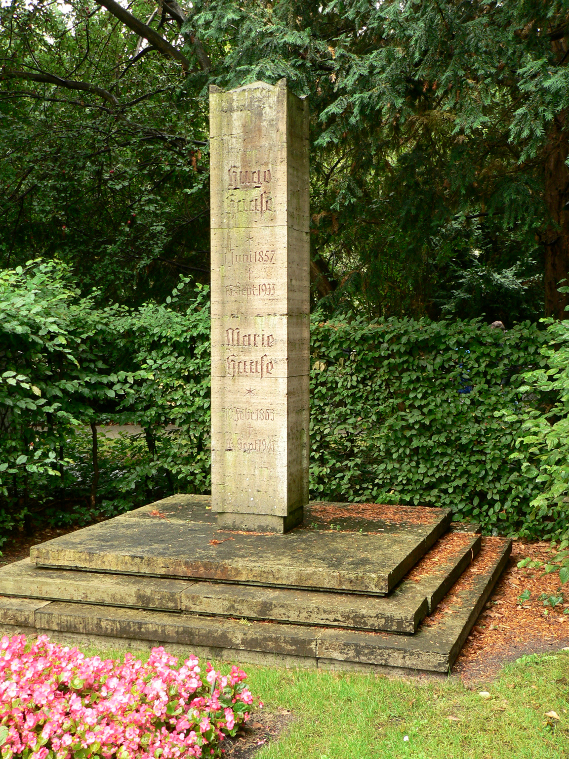 Grabmal für Hugo Haase (Karussellbauer) auf dem Engesohder Friedhof